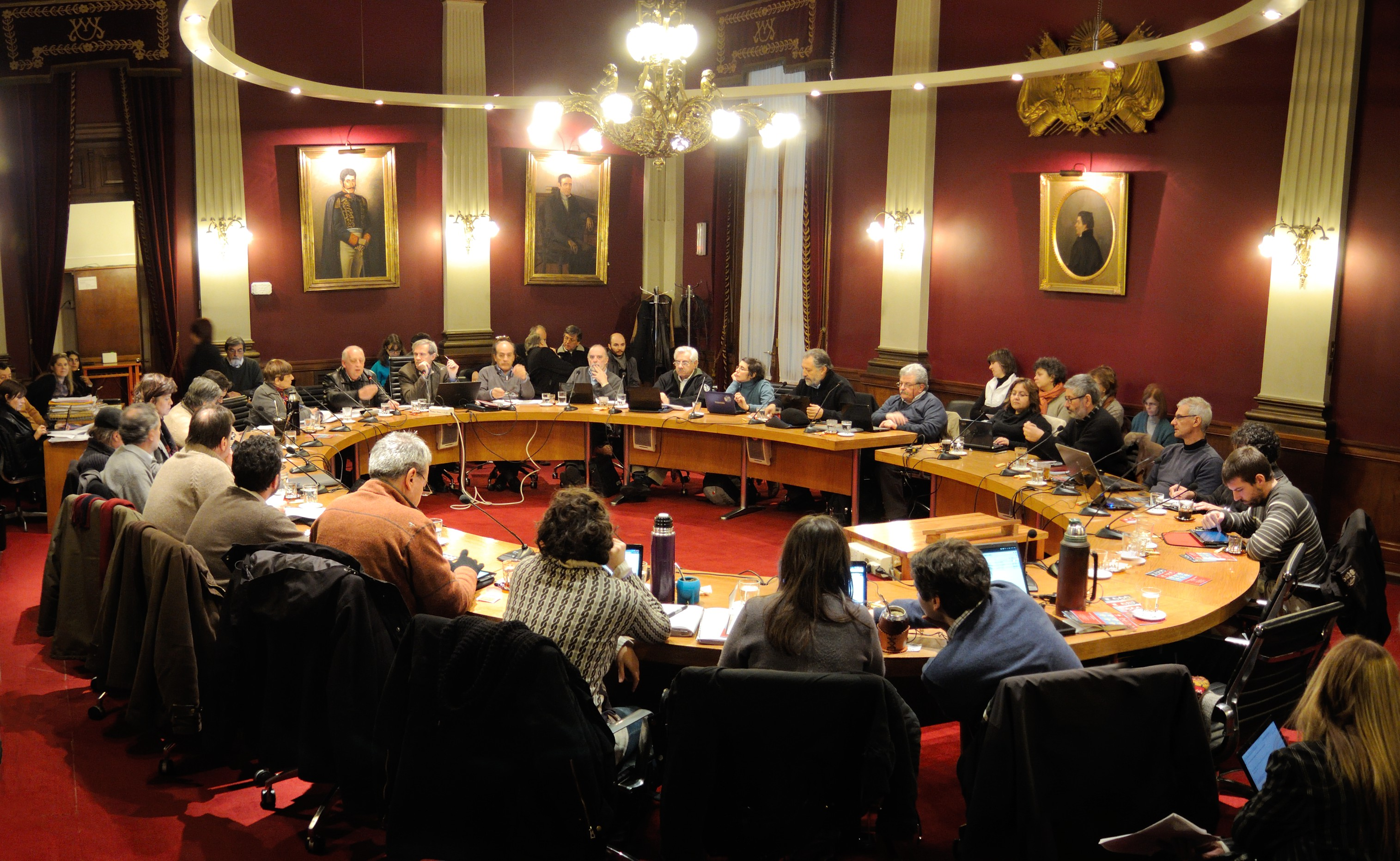 Reunión del Consejo Directivo Central de la Universidad de la República, Uruguay. Se aprecian los retratos de los presidentes Manuel Oribe y Joaquín Suárez y de Mons. Dámaso Antonio Larrañaga.